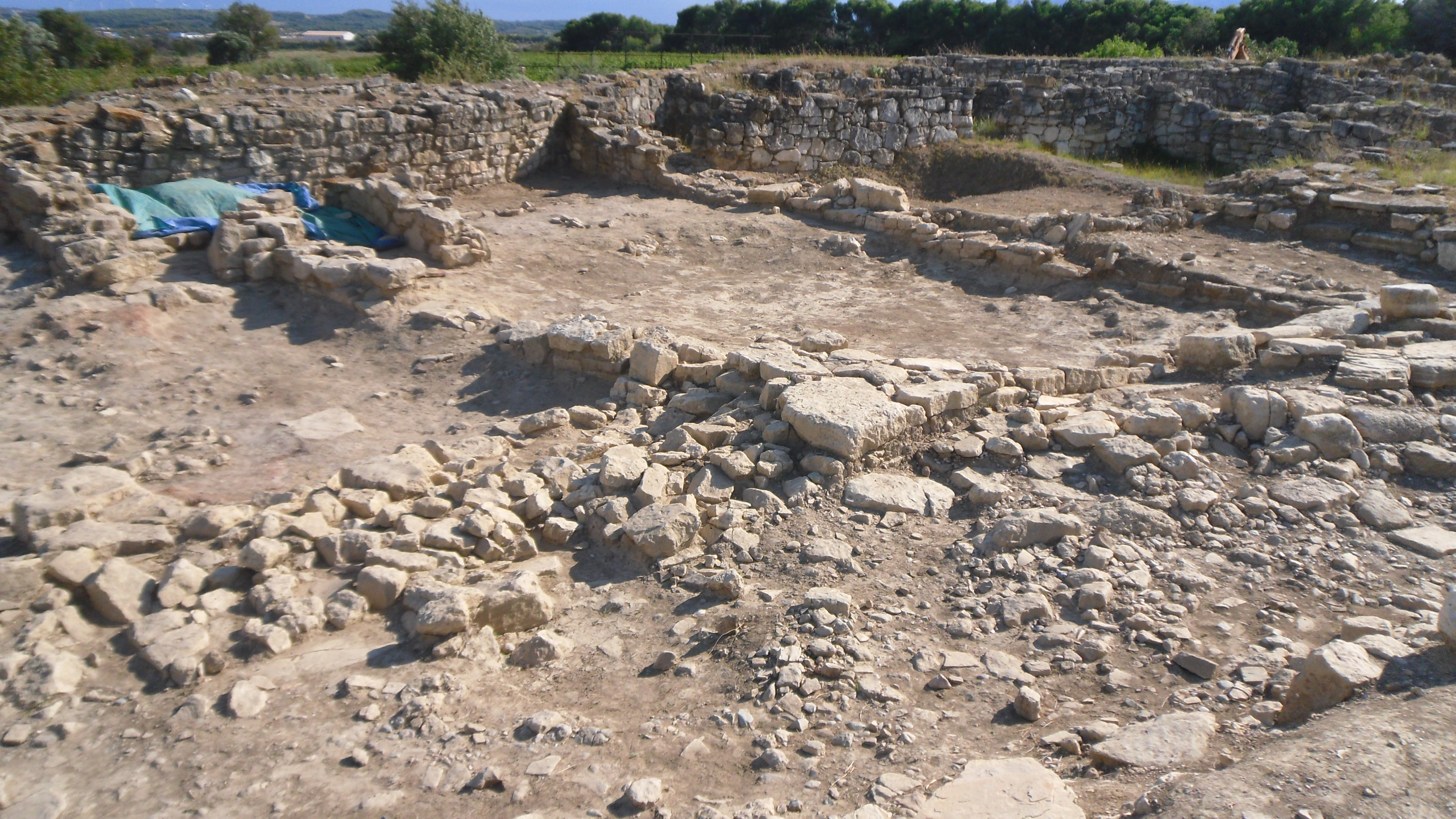 Pech Maho en 2011 habitat 77 5 8 et 10